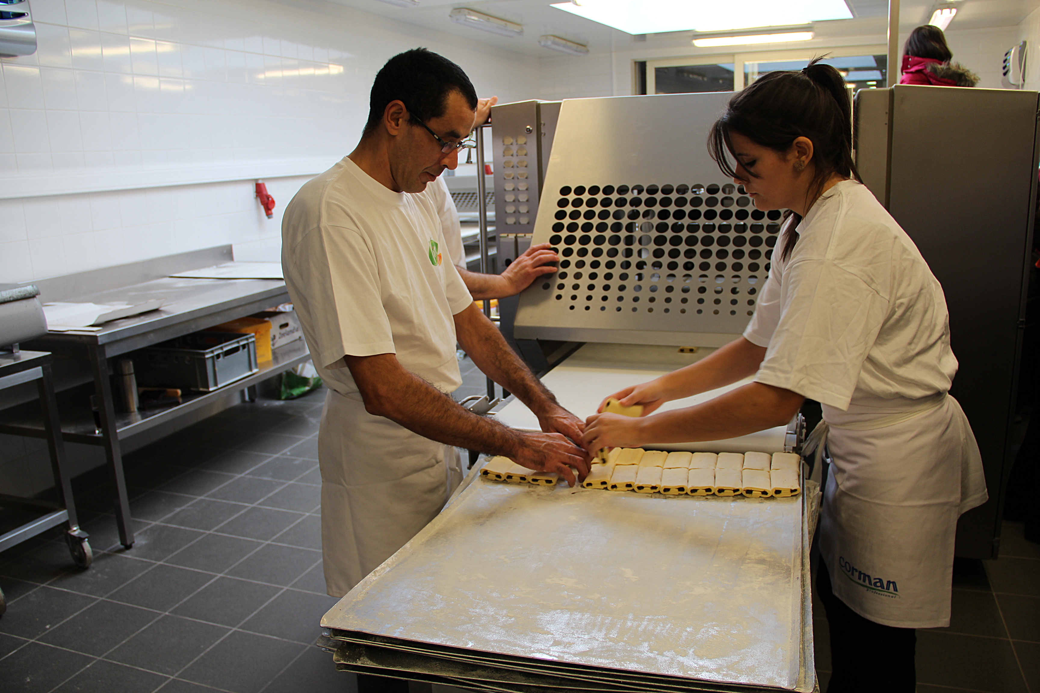 Atelier des viennoiseries de la boulangerie-pâtisserie Godefroid à Frameries.